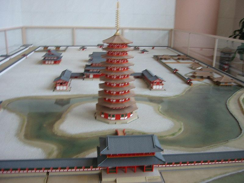 みやこめっせ 館外入り口付近にて法勝寺模型。